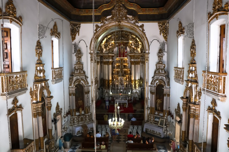 Igreja do Bonfim. Foto-Tatiana Azeviche-Setur Igreja do Bonfim, Salvador, Bahia, Brazil.